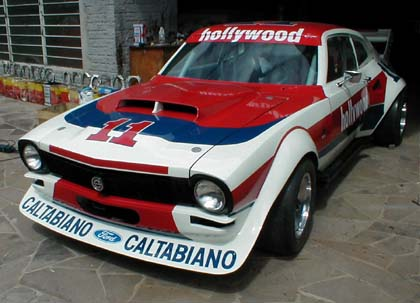 Fotografía del Ford Maverick del equipo Hollywood preparado en Argentina por Oreste Berta en 1974. El coche es propiedad del Museu do Automobilismo do Brasil